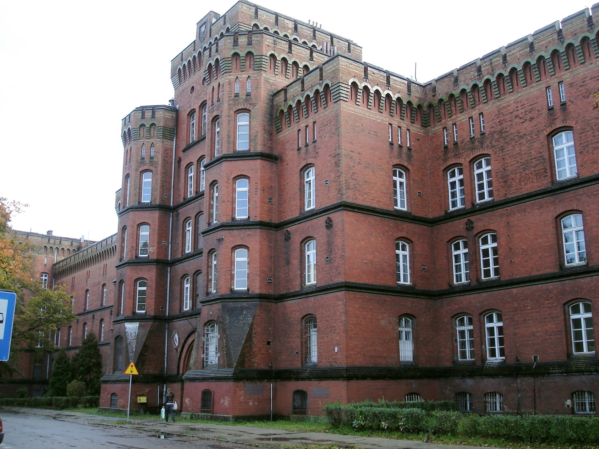 Czerwone koszary w Stargardzie Szczecińskim